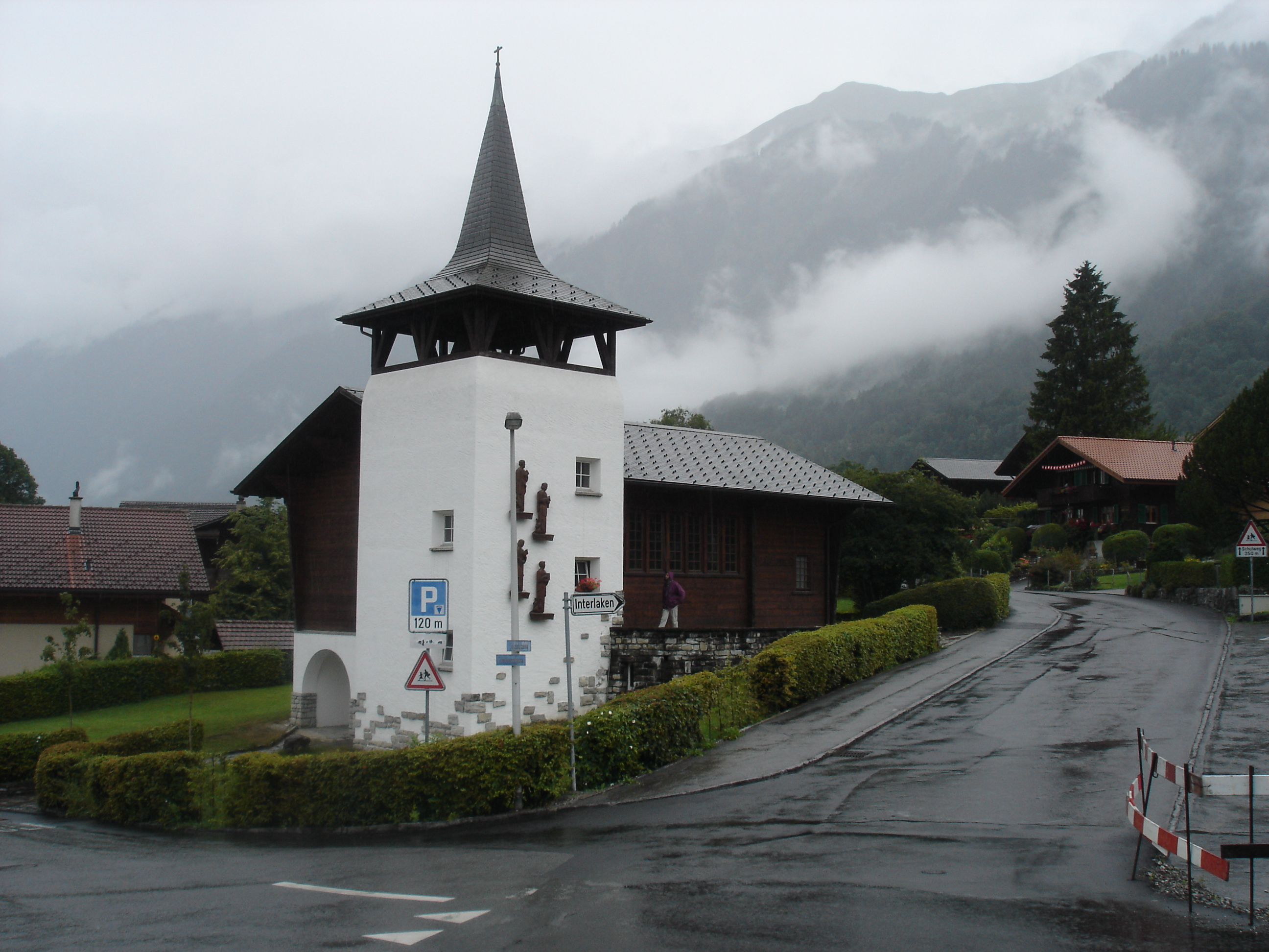 Katholische Kilche in Brienz